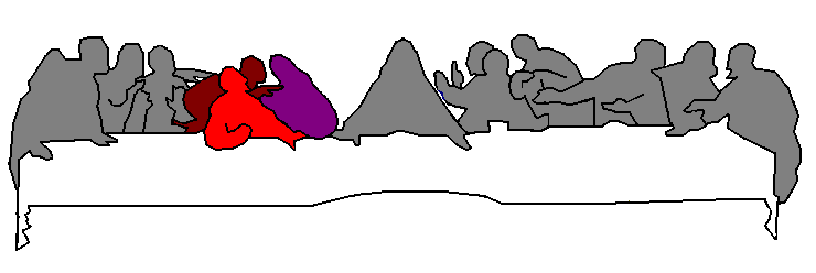 Last supper by Leonardo da Vinci